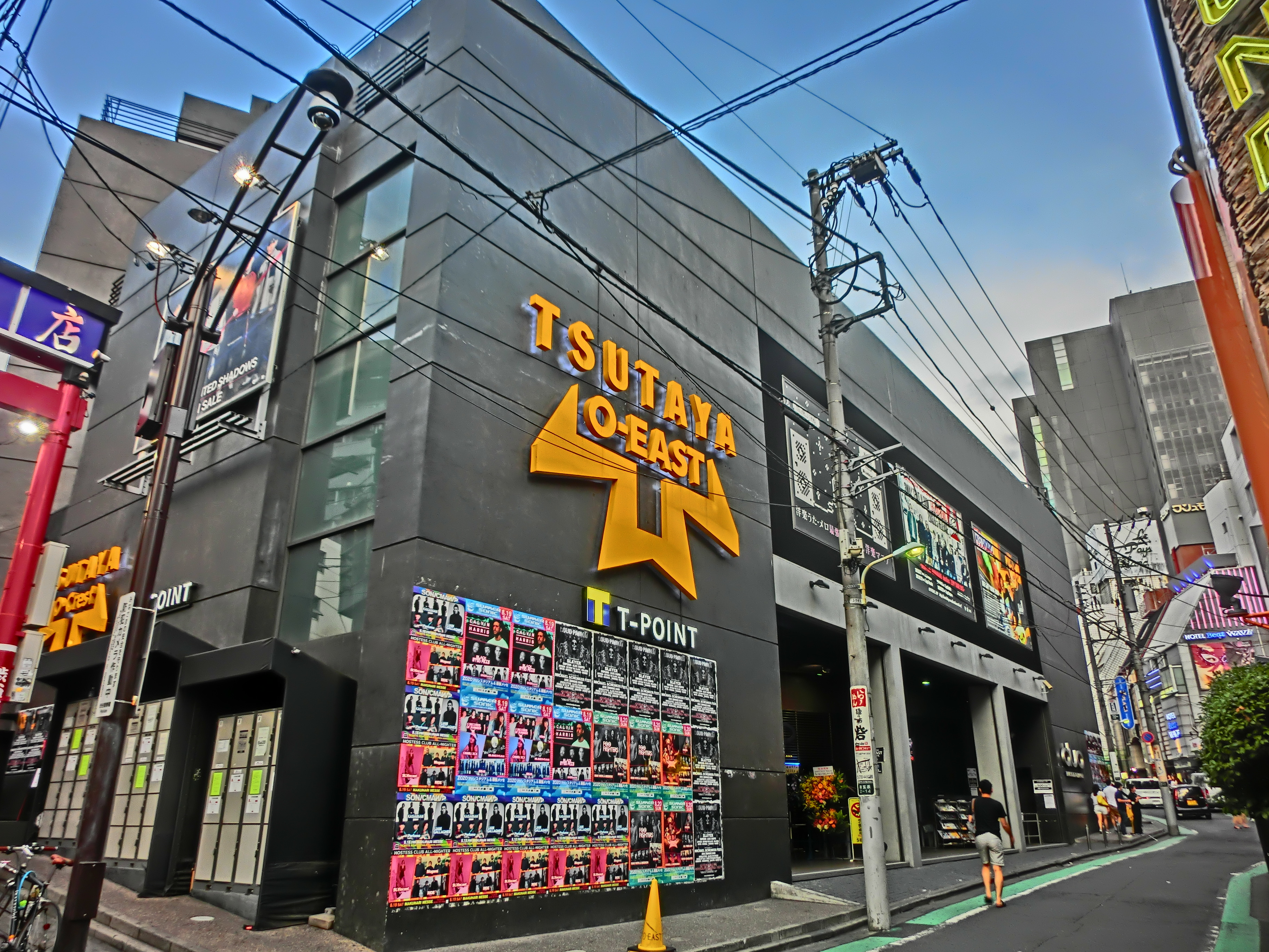 渋谷20170723-2